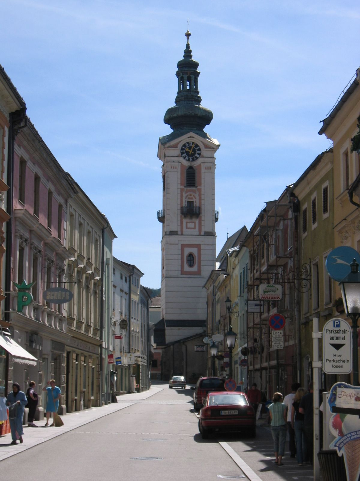 Pfarrgasse mit Blick auf den Kirchturm